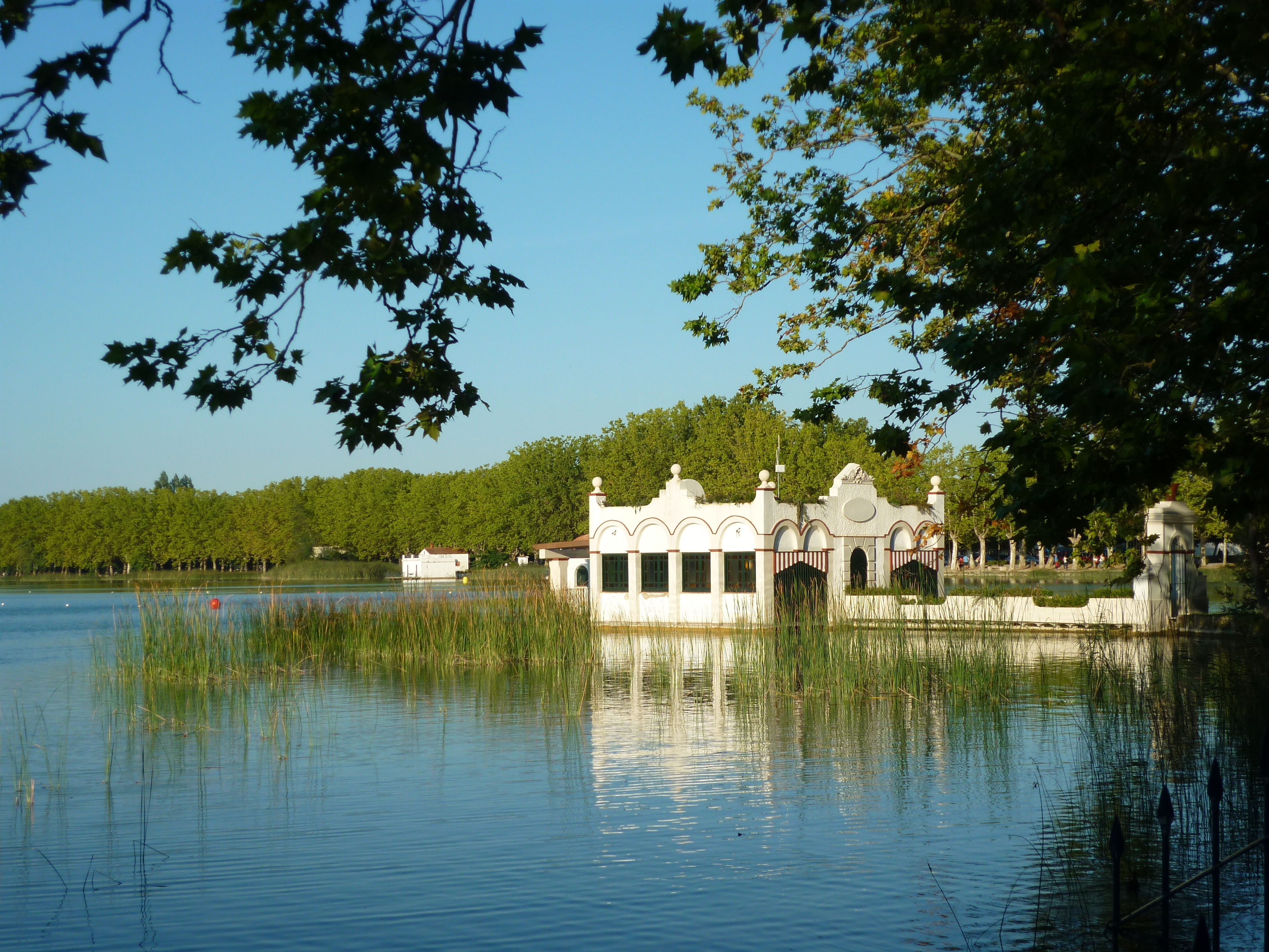 Pesqueres i passeigs de Banyoles